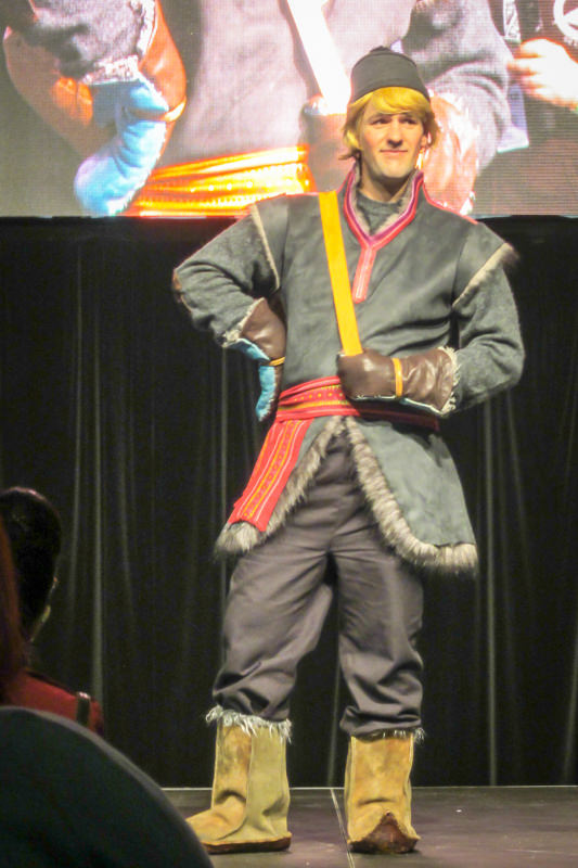 Kristoff from Frozen.